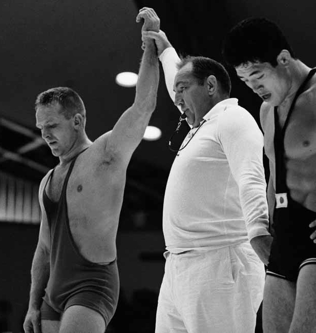 Bertil Nyström vs. Sadao Kazama, Tokyo Olympics